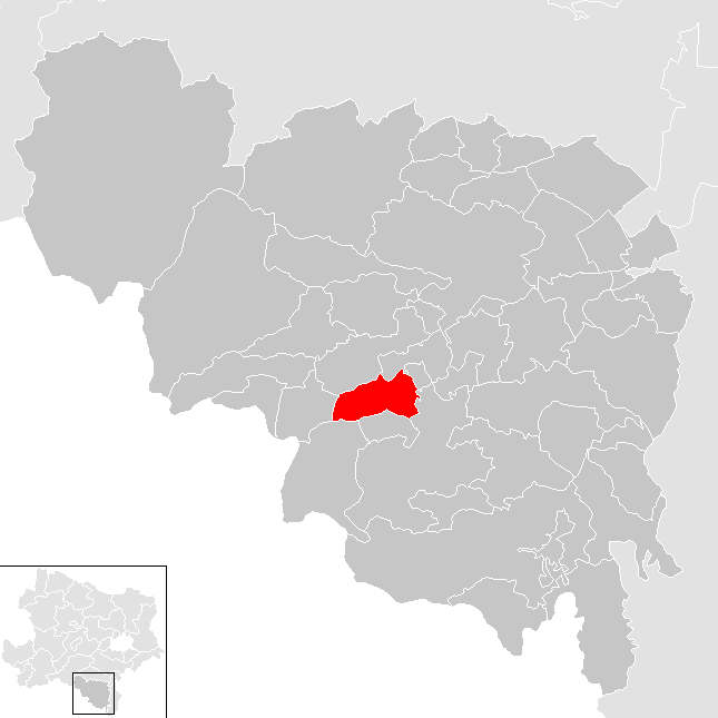 Bezirk Neunkirchen